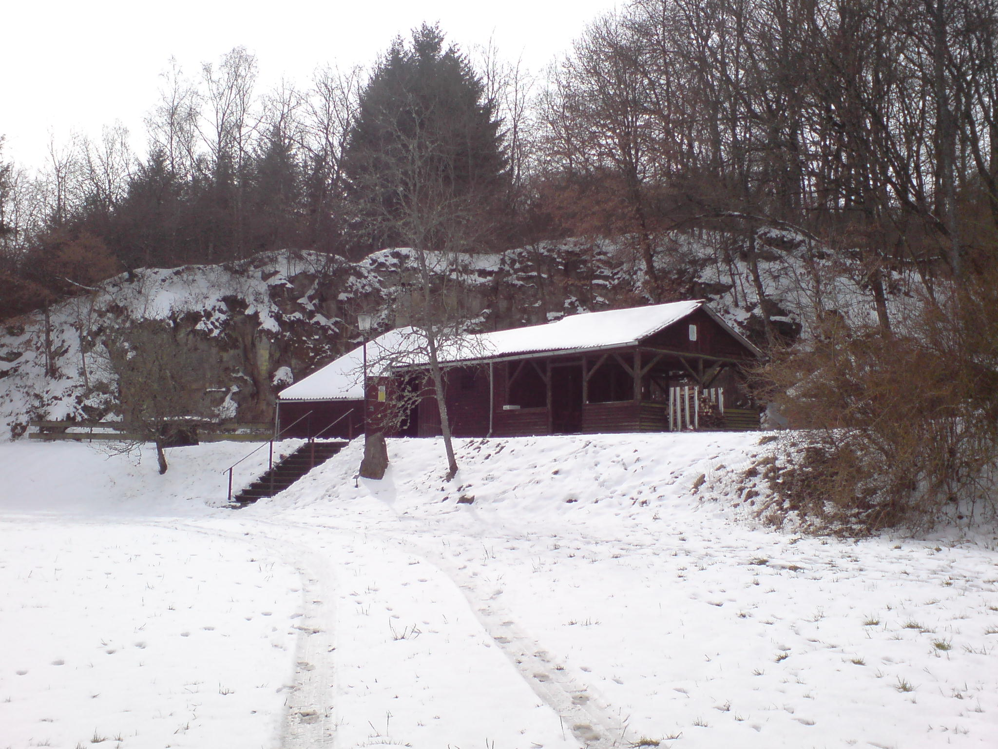 Die PWV-Hütte Lohnweiler.